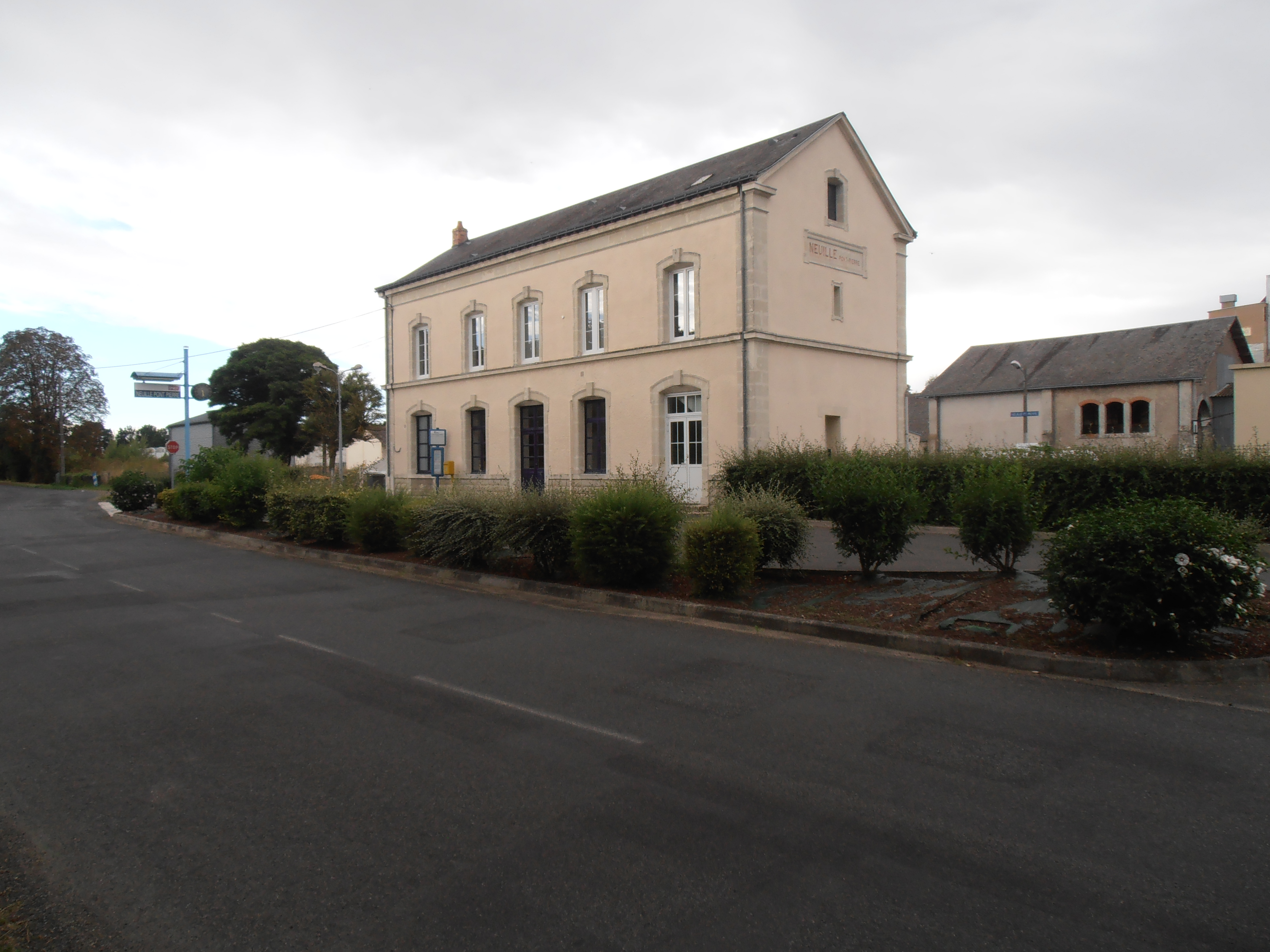 La gare et la place où s'arrêtent des cars TER